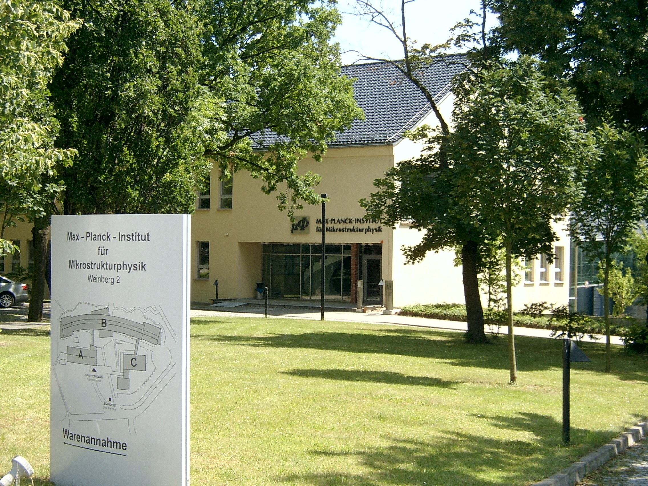 Max-Planck-Institut für Mikrostrukturphysik in Halle (Saale), Weinberg Campus, Weinbergweg 2.